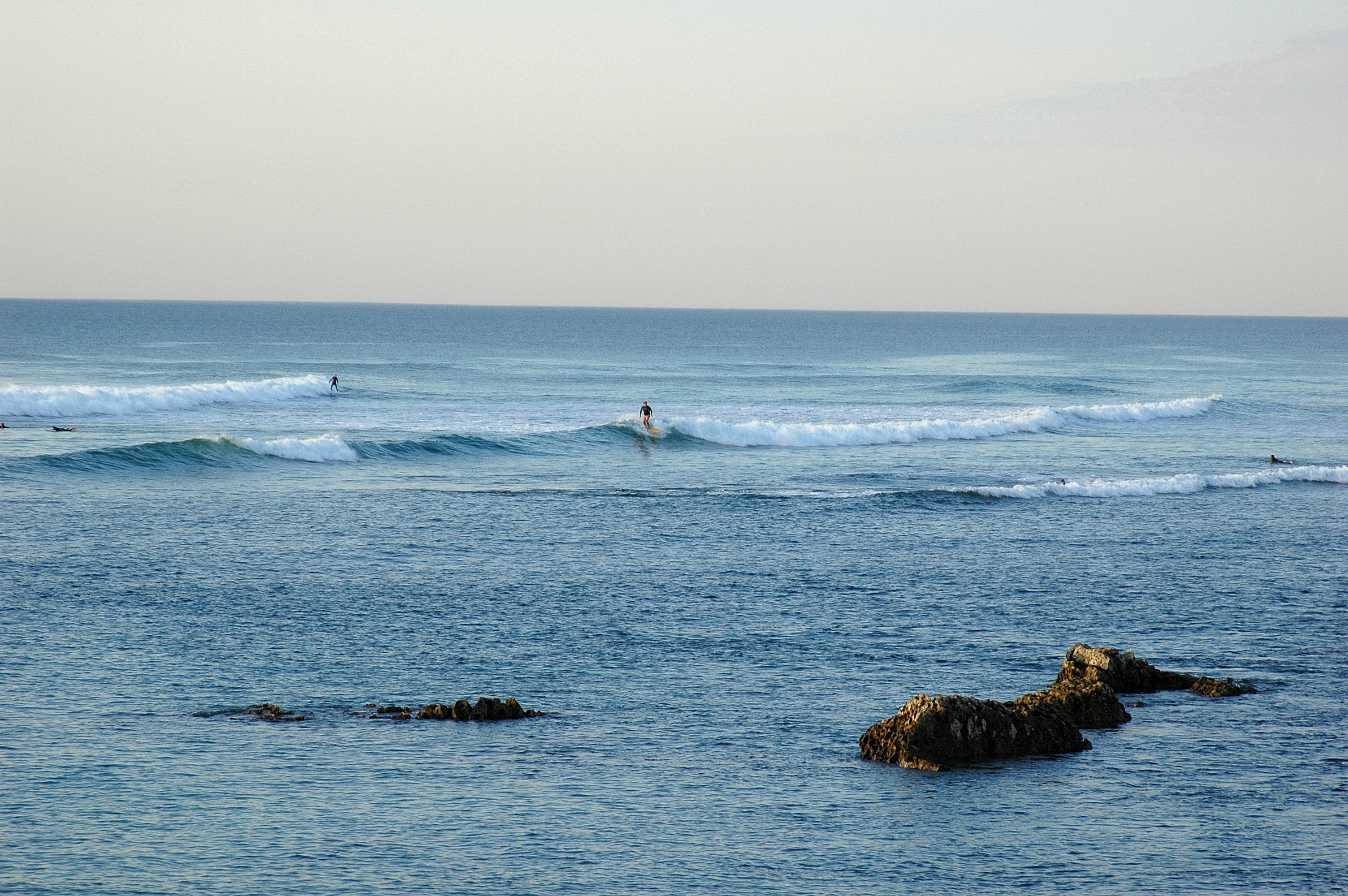 Guéthary, surfeurs sur la vague. Photo prise le 15/10/06 par Harrieta171